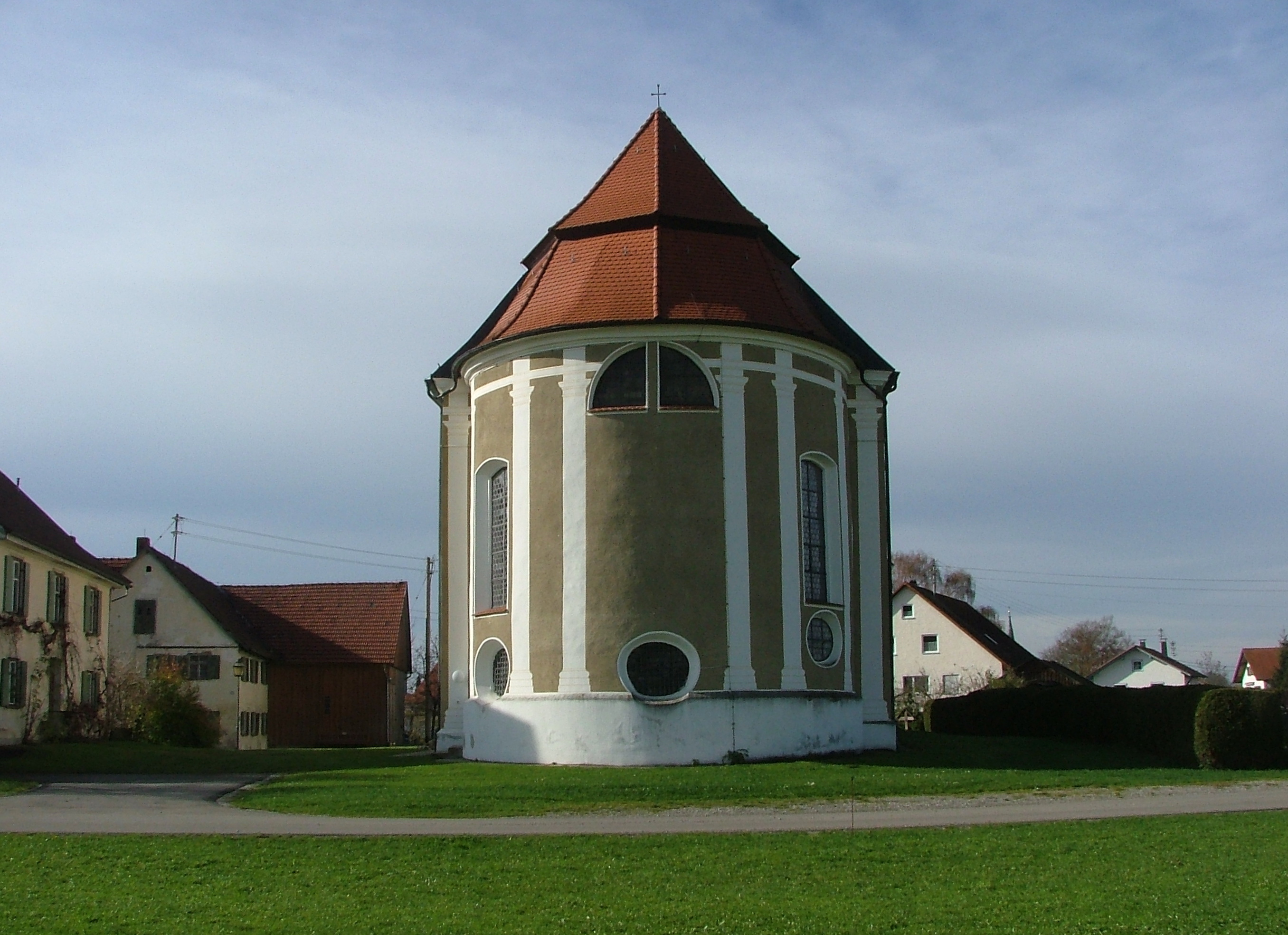 Lehenbühl Legau